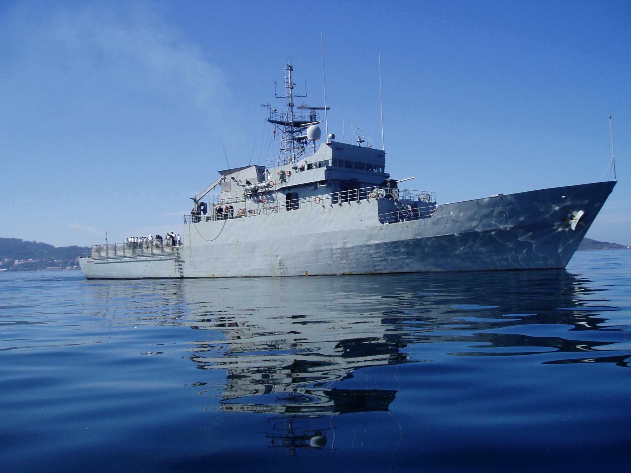 Patrullero de la Armada Española Atalaya (P-74), de la clase Serviola